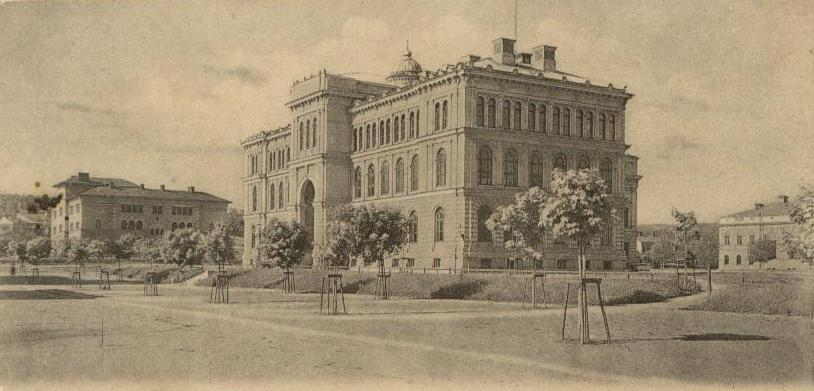 Sundsvalls Elementärläroverk